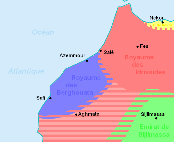 Carte du Royaume des Berghouata (Tamesna)